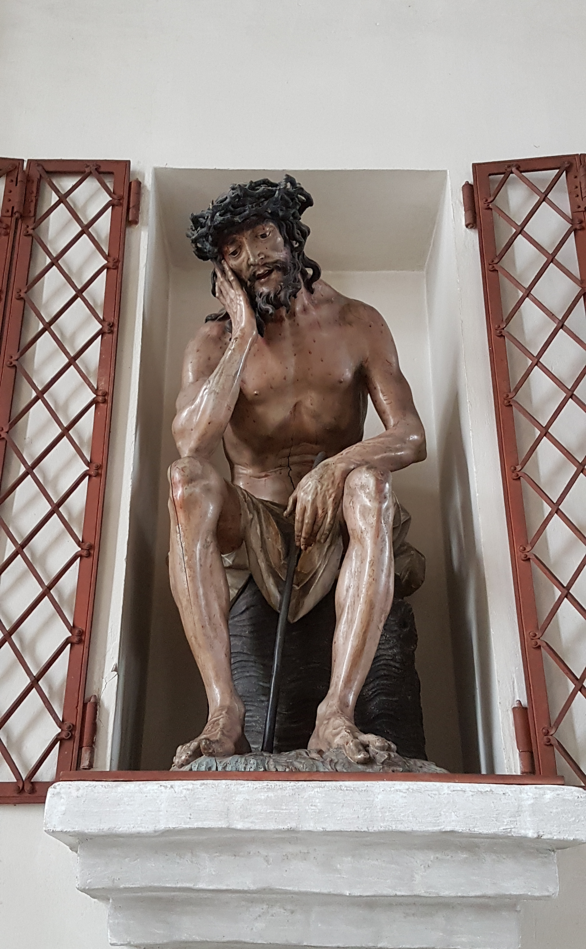 Liebfrauenmünster Donauwörth, "Christus in der Rast" vom linken Seitenaltar